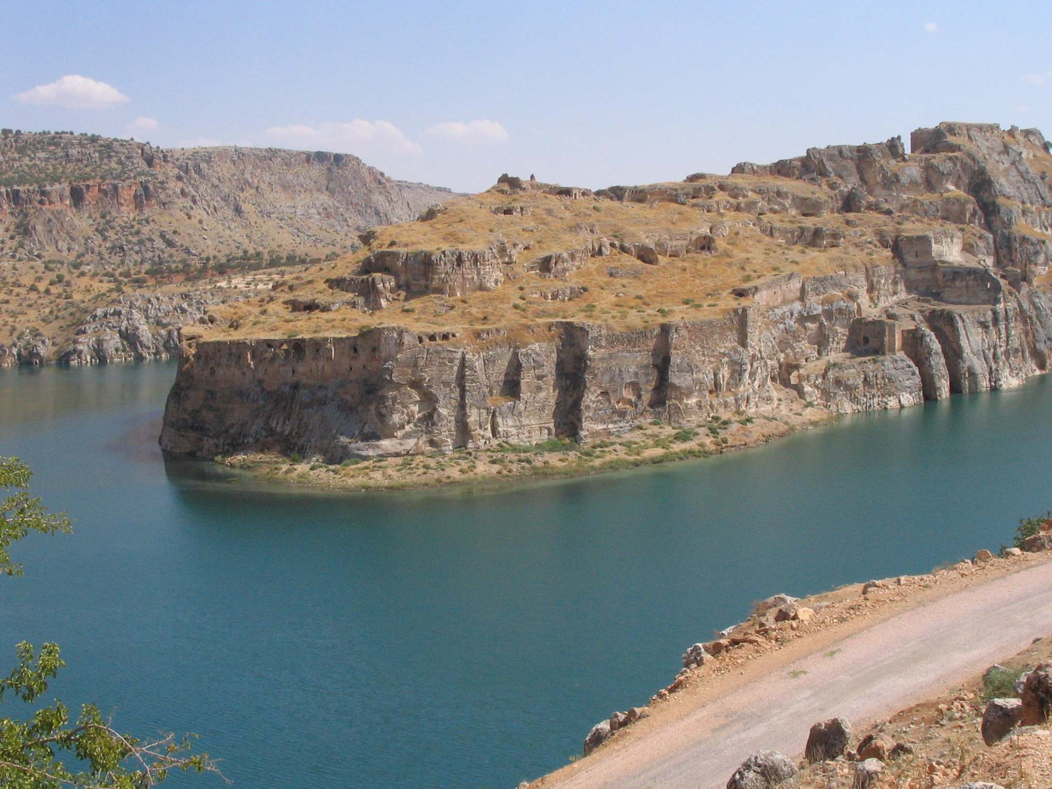 Rumkale (Hromkla), Burgruine am Euphrat nahe Gaziantep, Südosttürkei